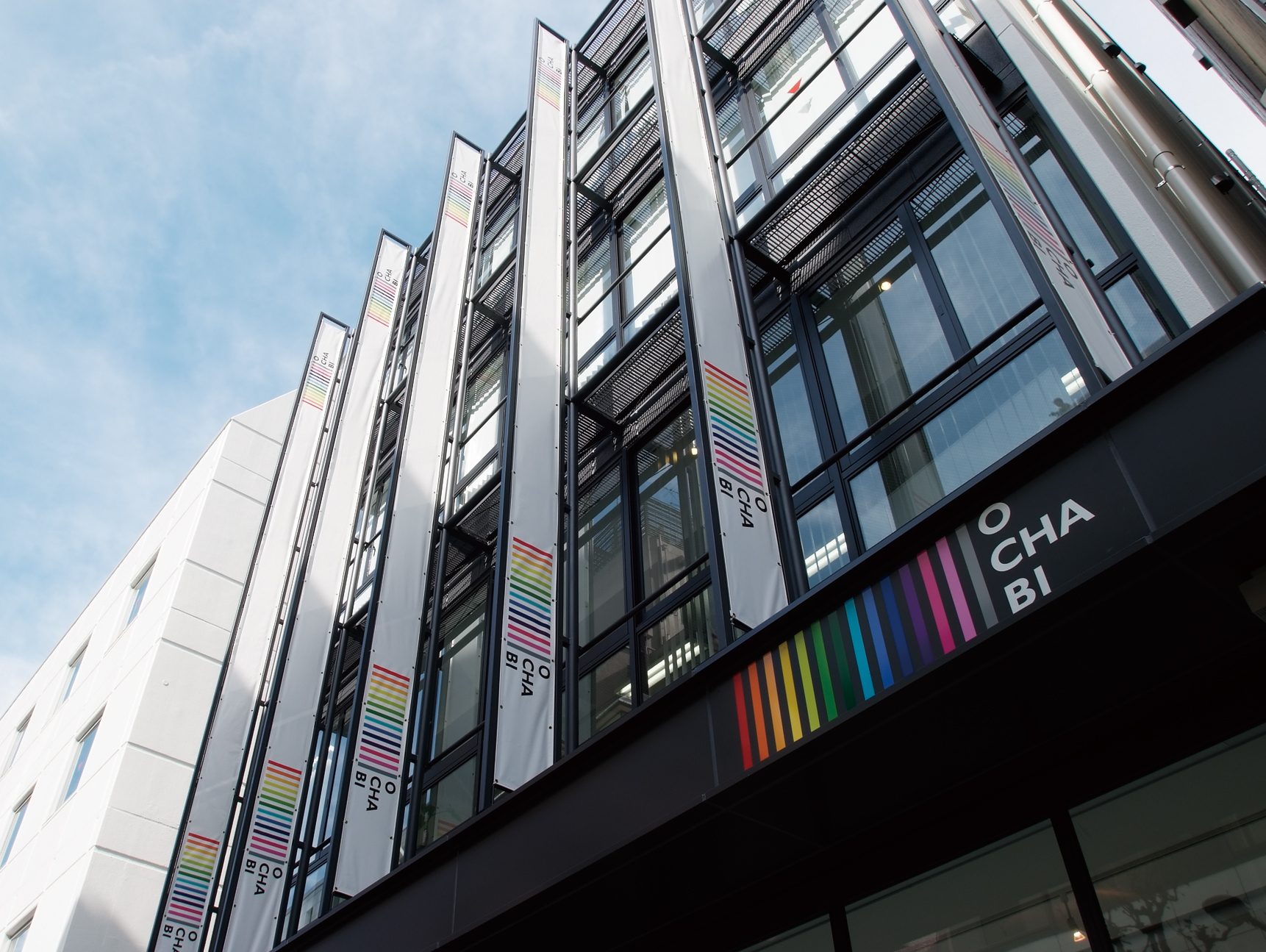 御茶ノ水校舎、正面。